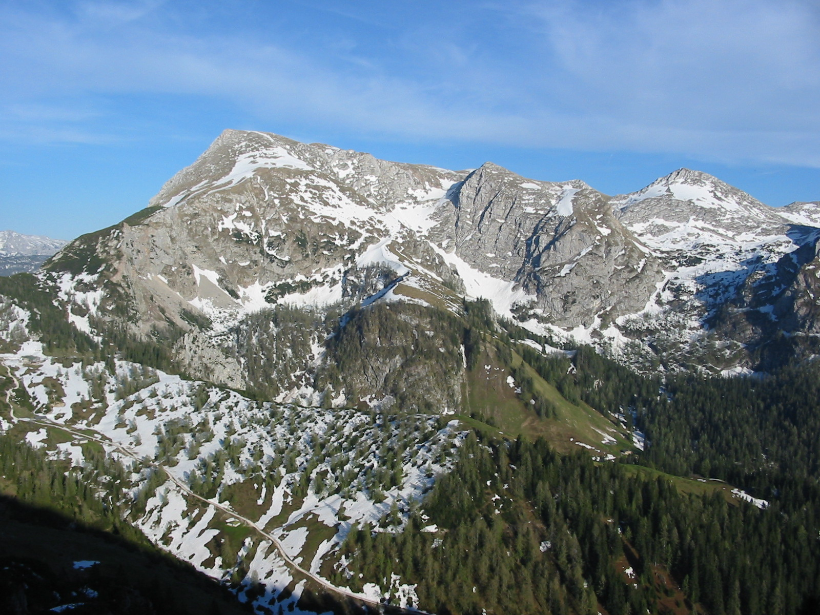 Schneibstein von Nordwesten